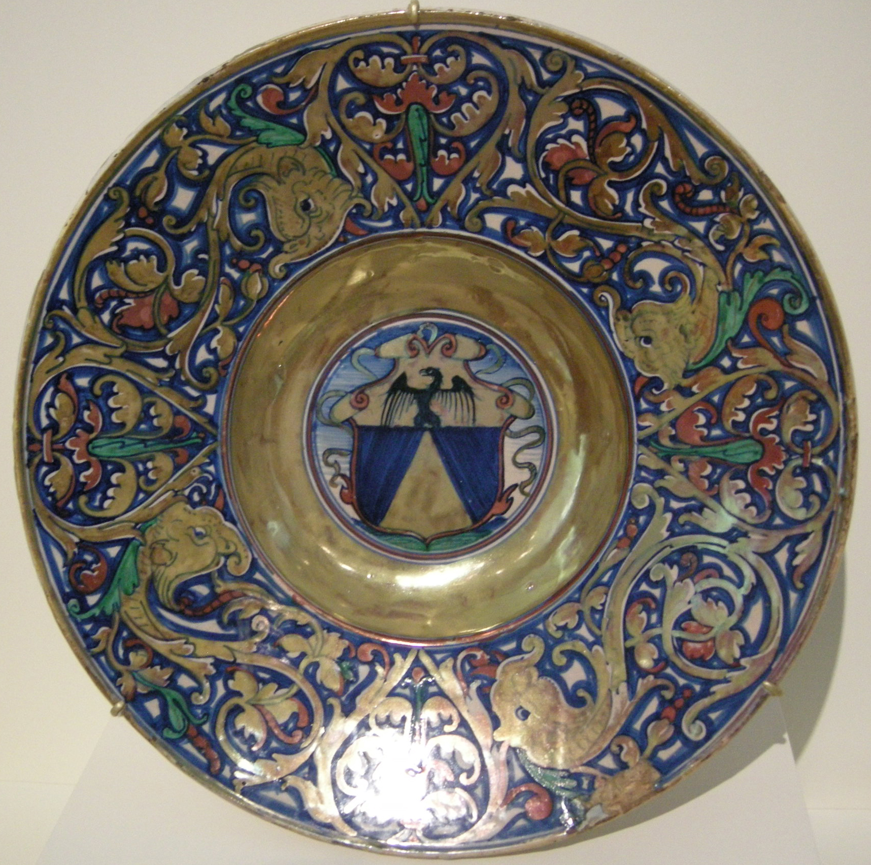 Gubbio maiolica, giorgio di pietro andreoli, piatto con stemma vegerio, 1524